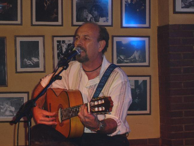 Javier Ruibal (El Puerto de Santa María, 1955) en directo en el pub Chubby Cheek de Jaén.